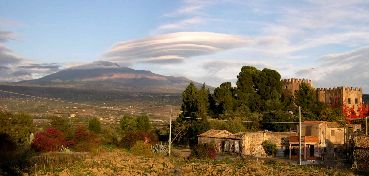 Etna vulcan from Carcaci's Castle